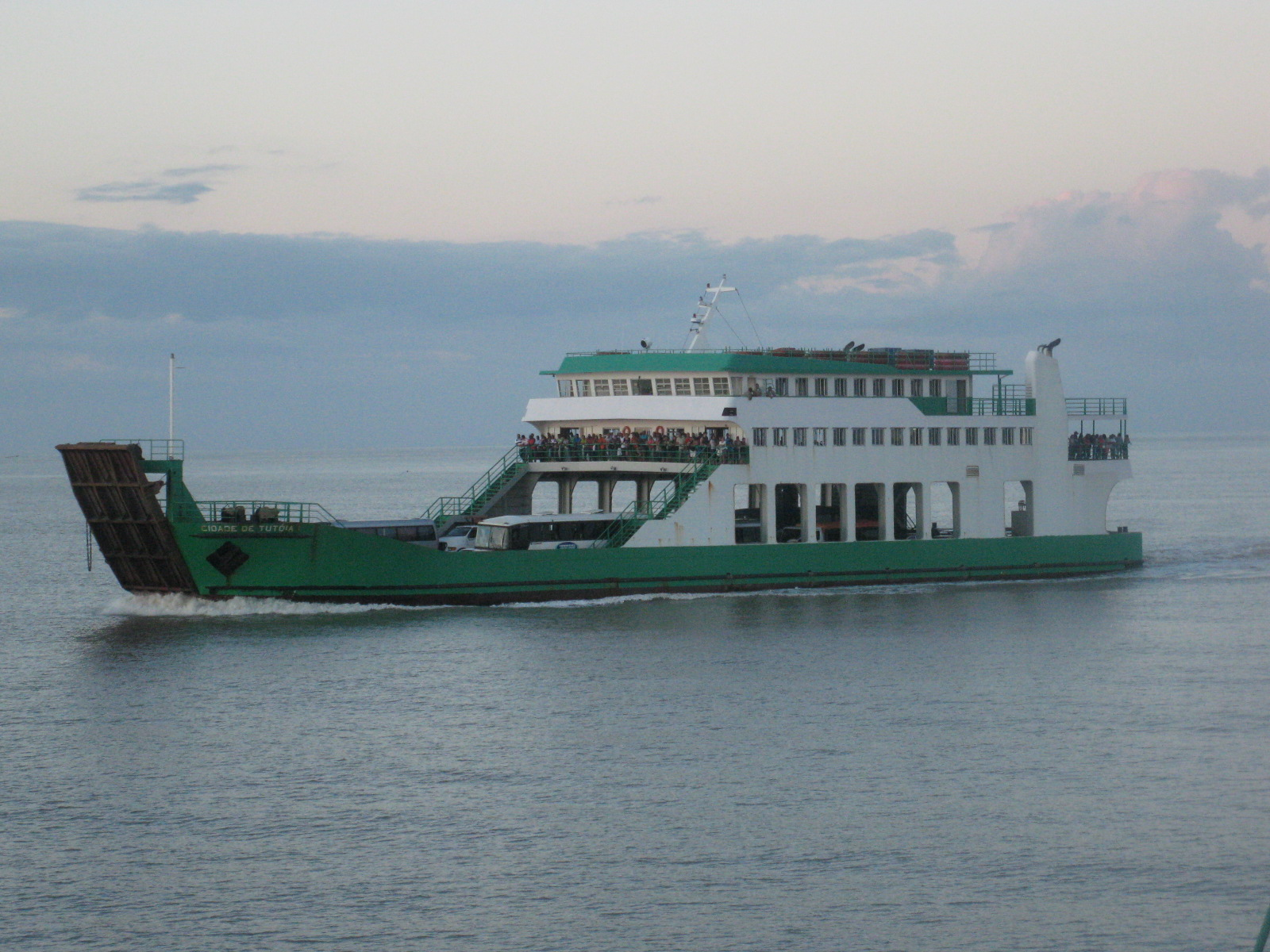 Ferry-boat Cidade de Tutóia I realizando a viagem entre o terminal de Ponta da Espera e o Cujupe.